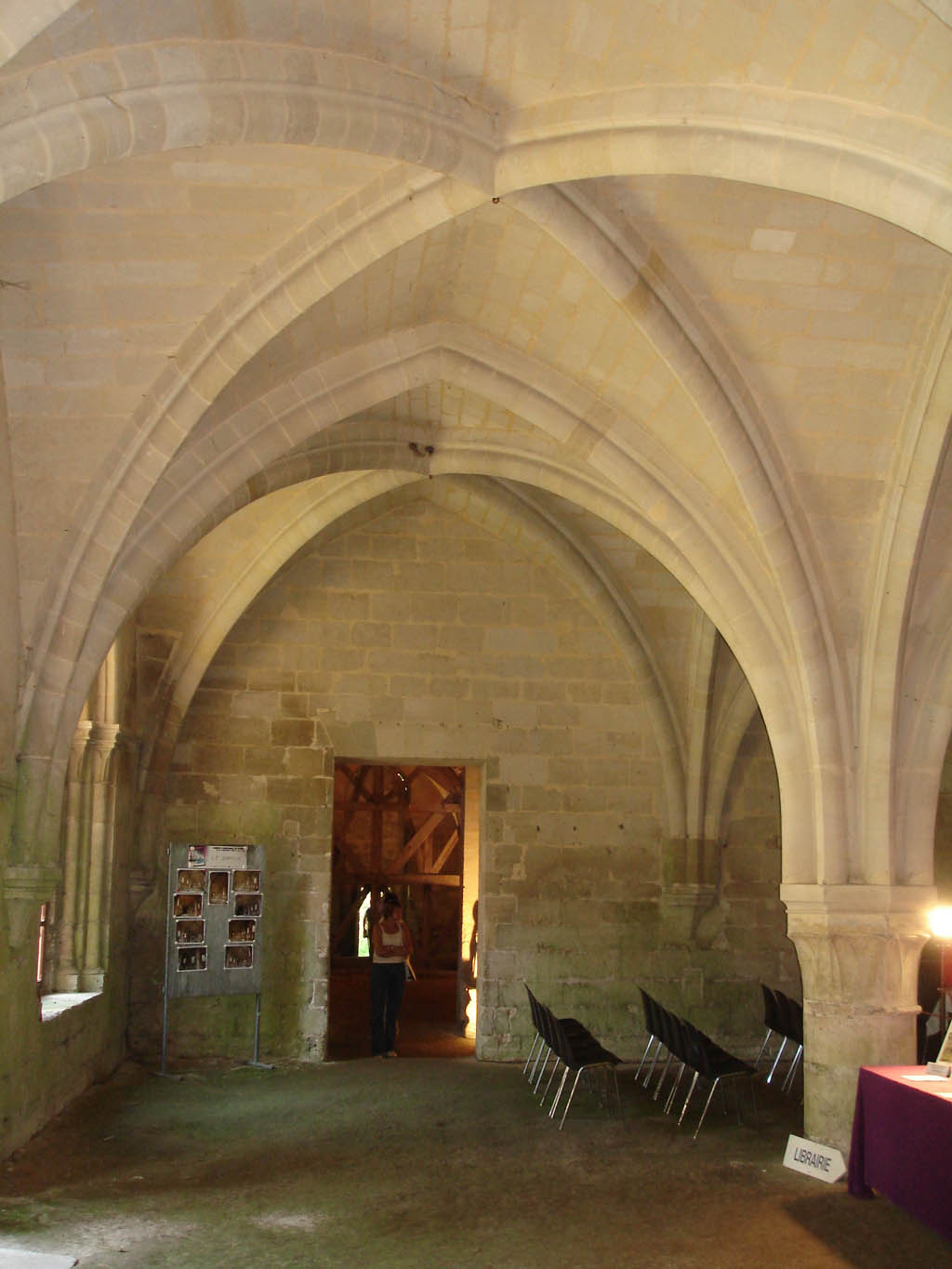 Abbaye Notre-Dame du Val, salle capitulaire, Mériel (Val-d'Oise), France.